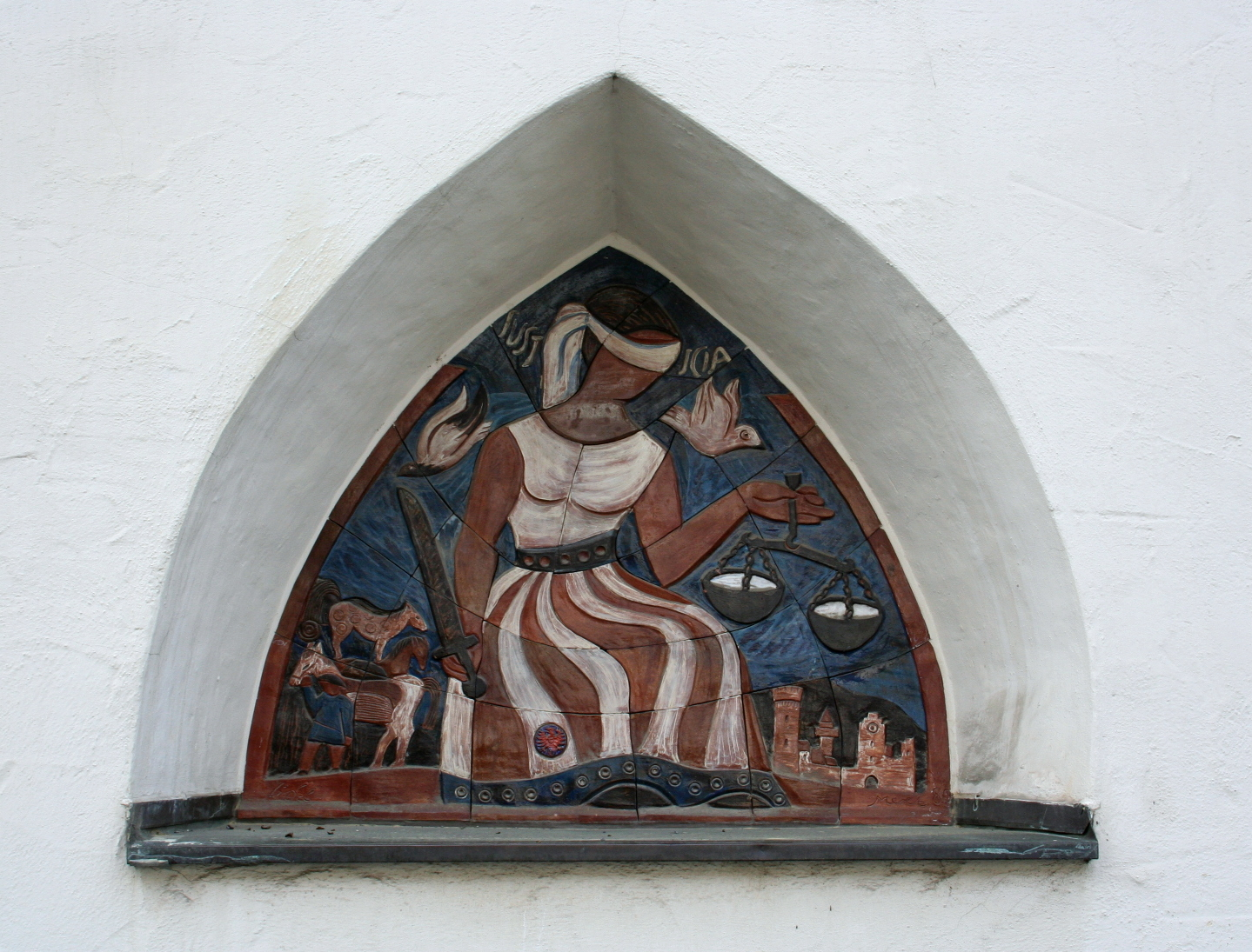 Fassadendetail (Meret Eichler: Iustitia) am Gebäude des Landgerichts Ravensburg (ehem. Karmeliterkloster am Marienplatz) in Ravensburg